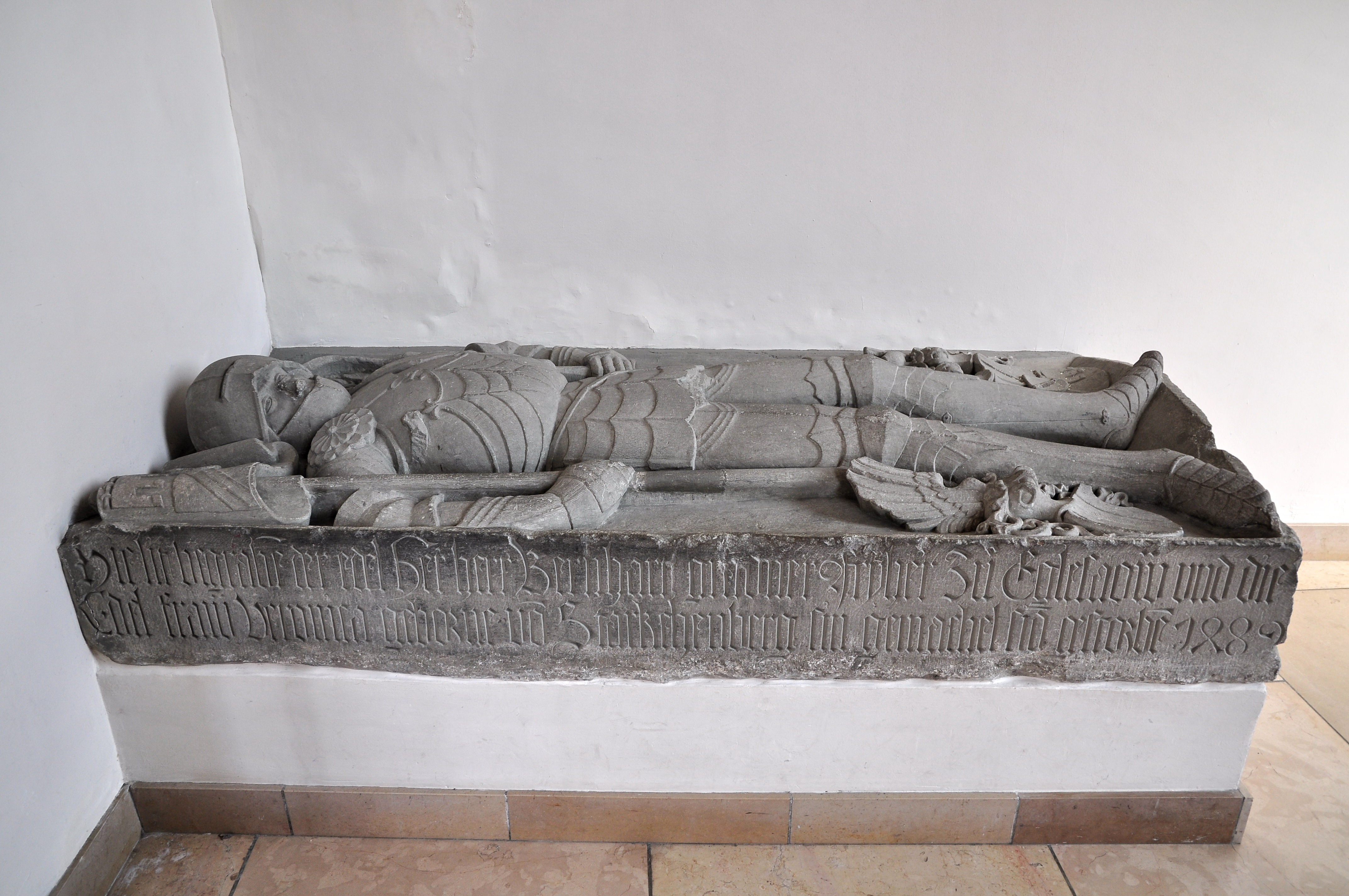 Reformierte Kirche, Chilengass in Eglisau (Switzerland) : Grabmal des Bernhard Gradner und seiner Frau Veronika von Starkenberg.